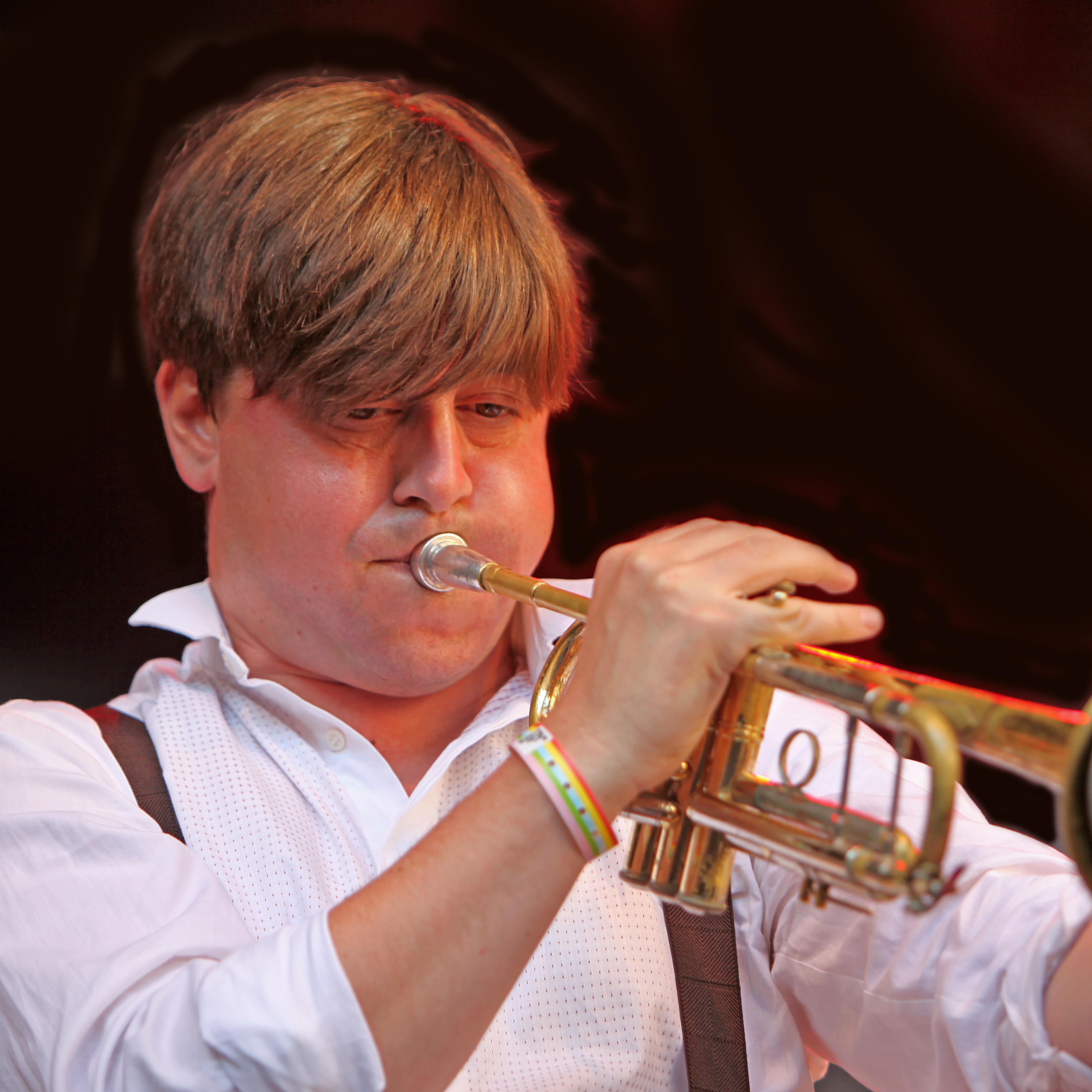 Goran Kajfes at Stockholm Jazz Fest 2009